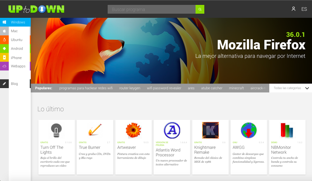 Imagen de portada